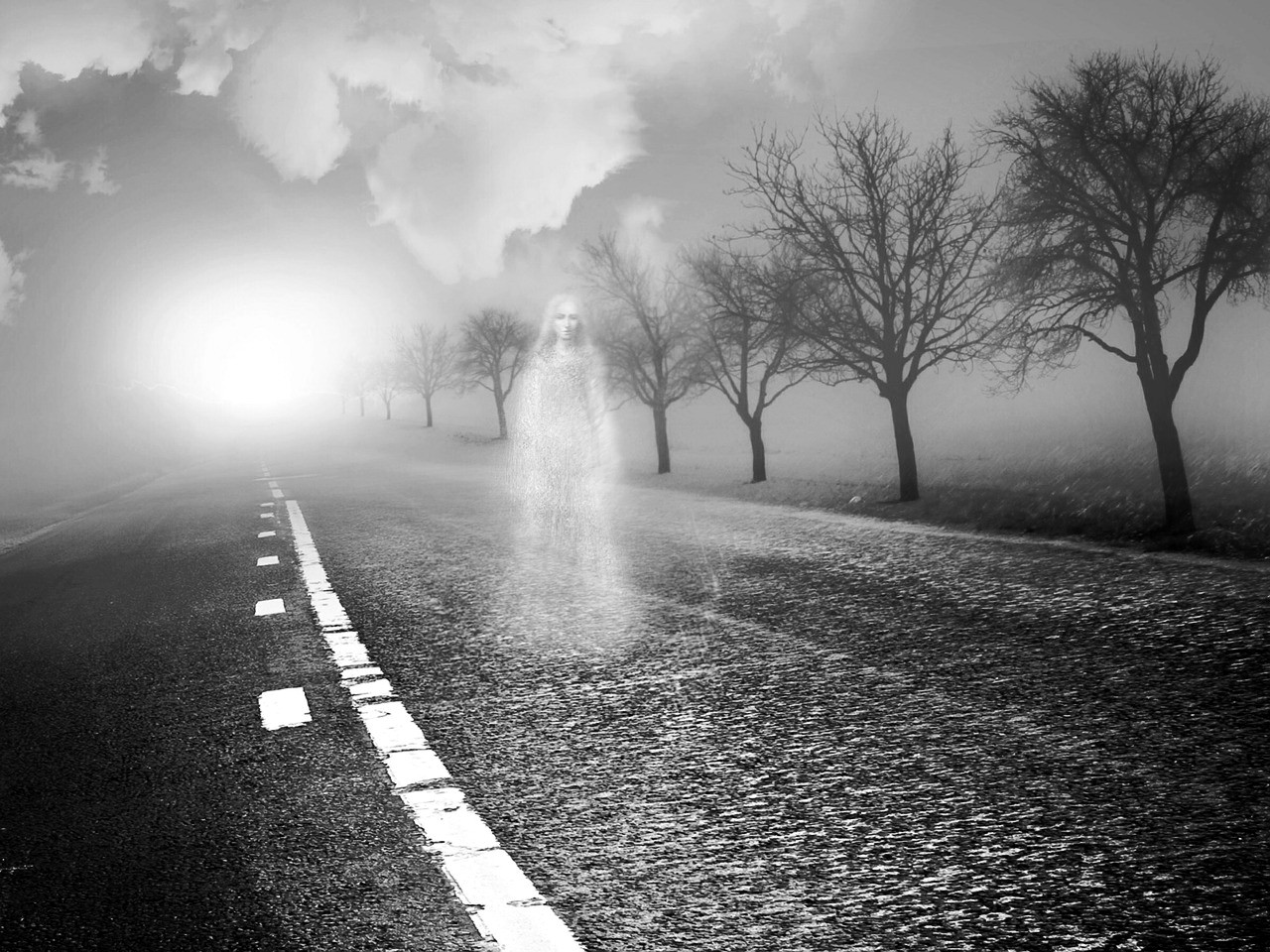 Weibliches Gespenst auf einer Straße, künstlerische Darstellung